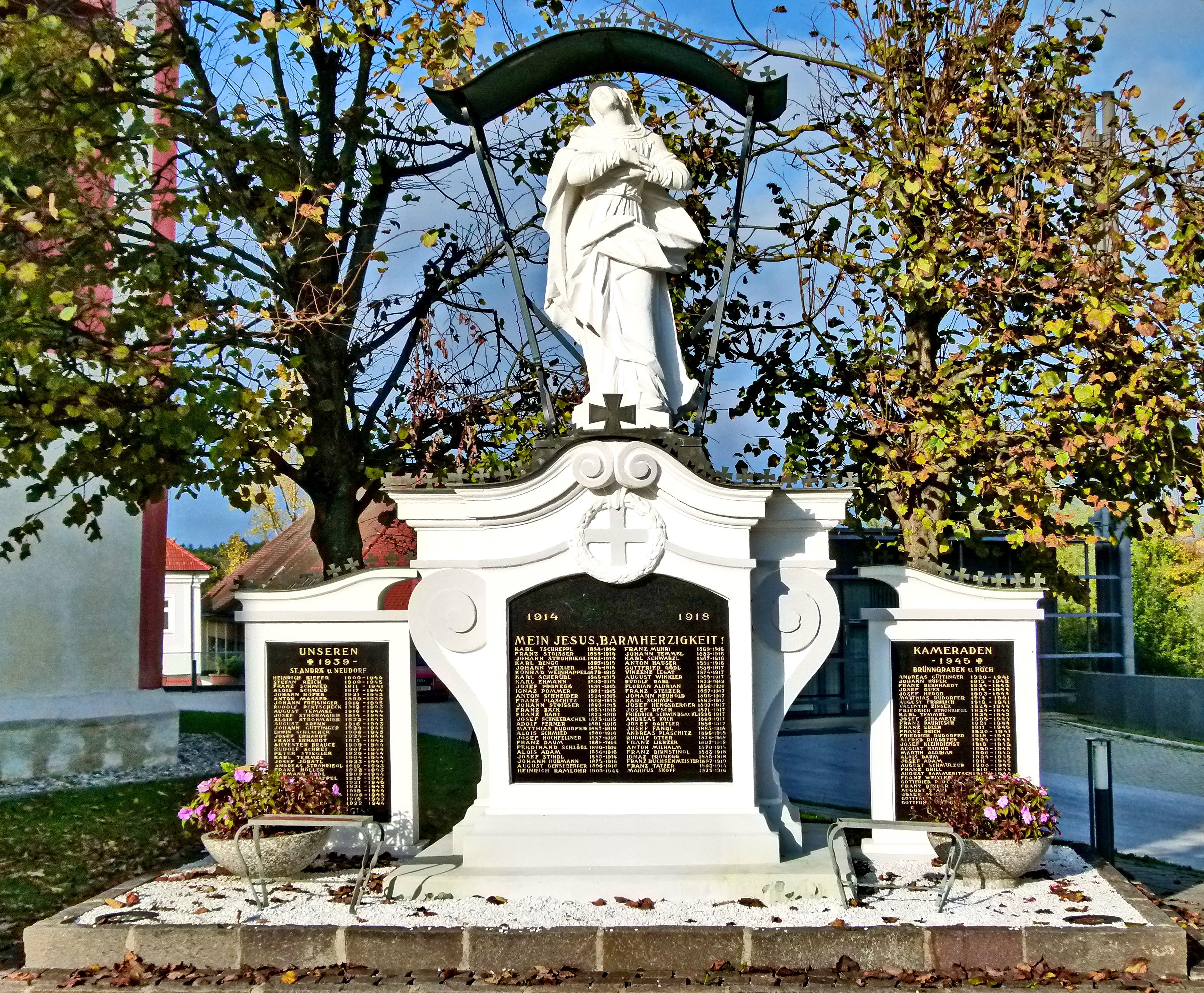 Kriegerdenkmal